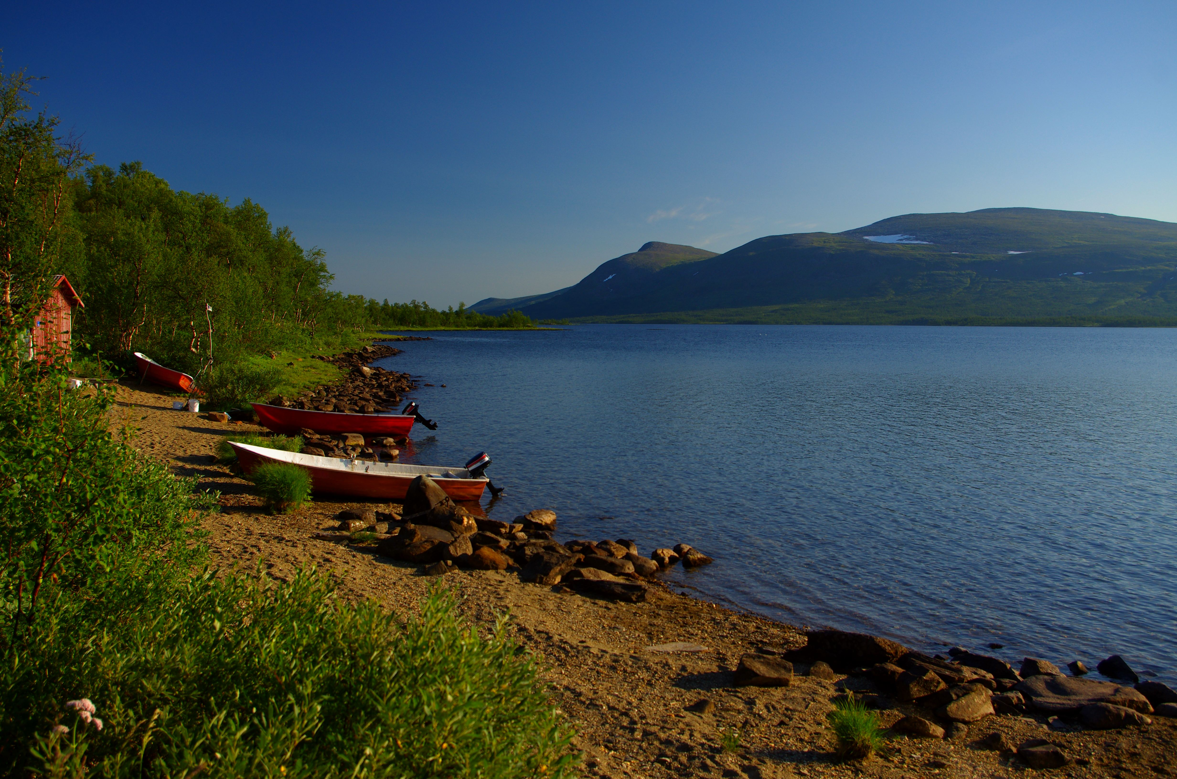 Tärnasjön eller Deärnnájávrrie är en sjö i Sorsele kommun i Lappland i Sverige. Kungsleden passerar sjön.